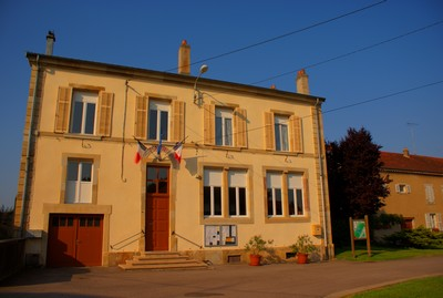 Mairie de Fenneviller